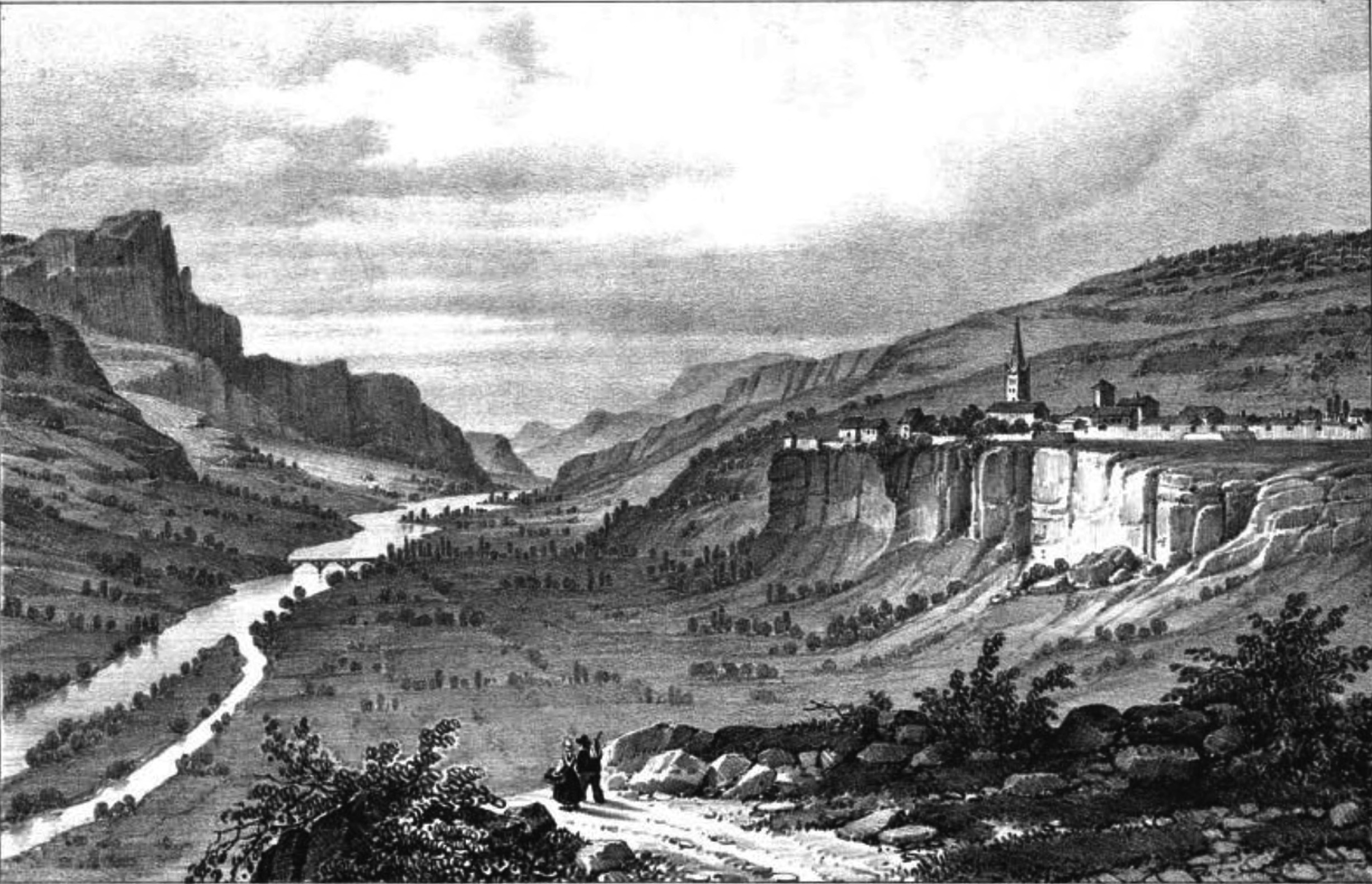 Album du Dauphiné - tome III, litographie. Embrun, Hautes-Alpes